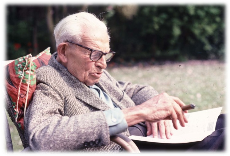 Curt Eisner, entomologist